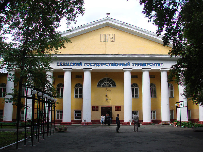 Корпус №5